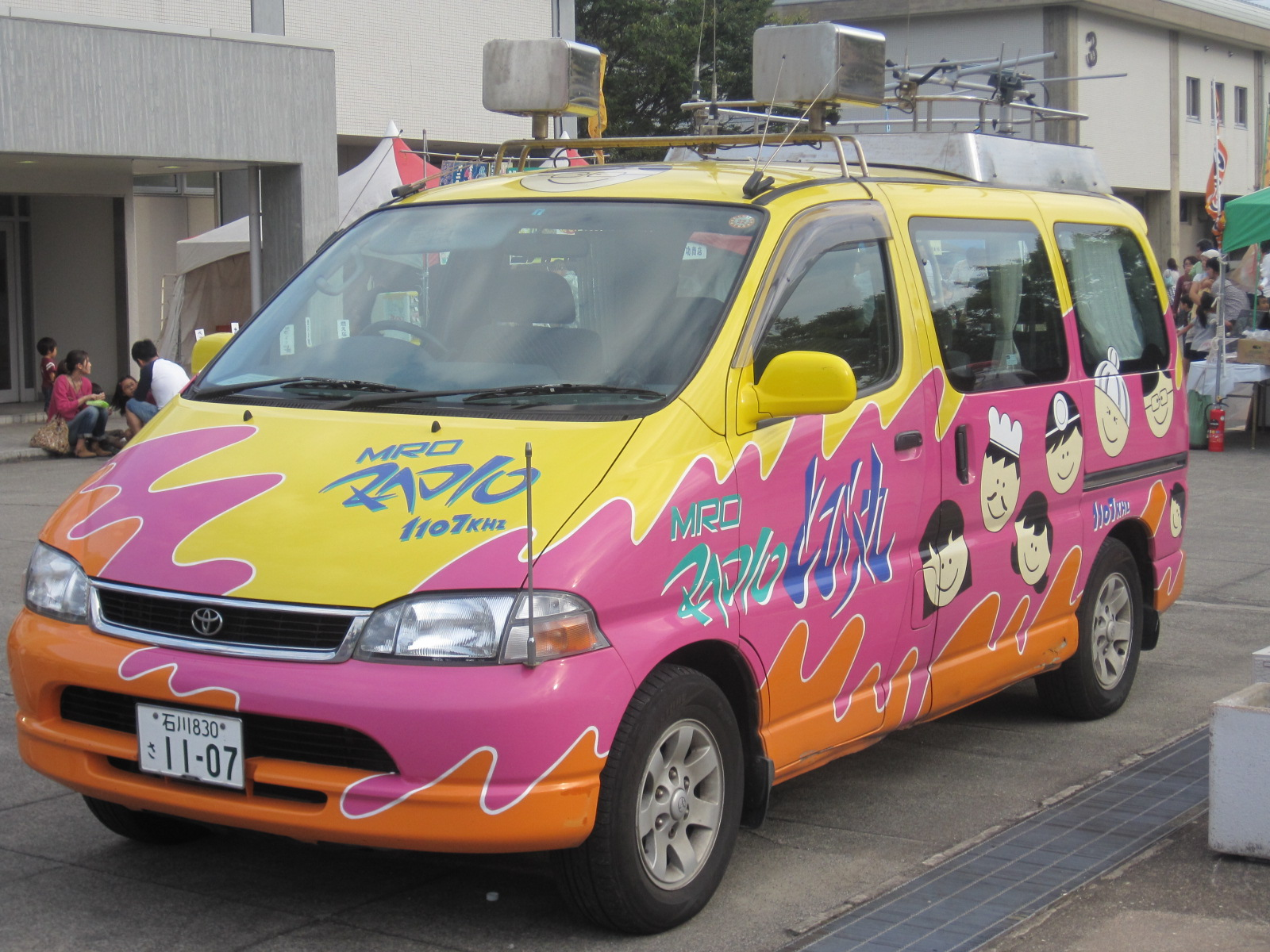 北陸放送のラジオカー。「とび丸」という愛称が付けられており、車両はトヨタ自動車のグランビアを採用している。2010年9月26日、石川県産業展示館にて撮影。